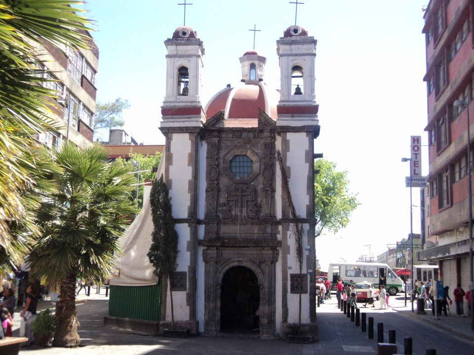 callejon manzanares